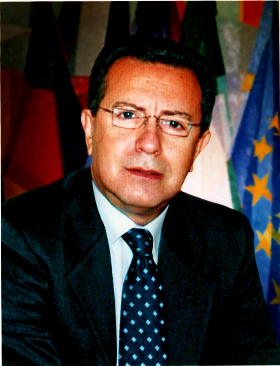 Prefetto Francesco La Motta